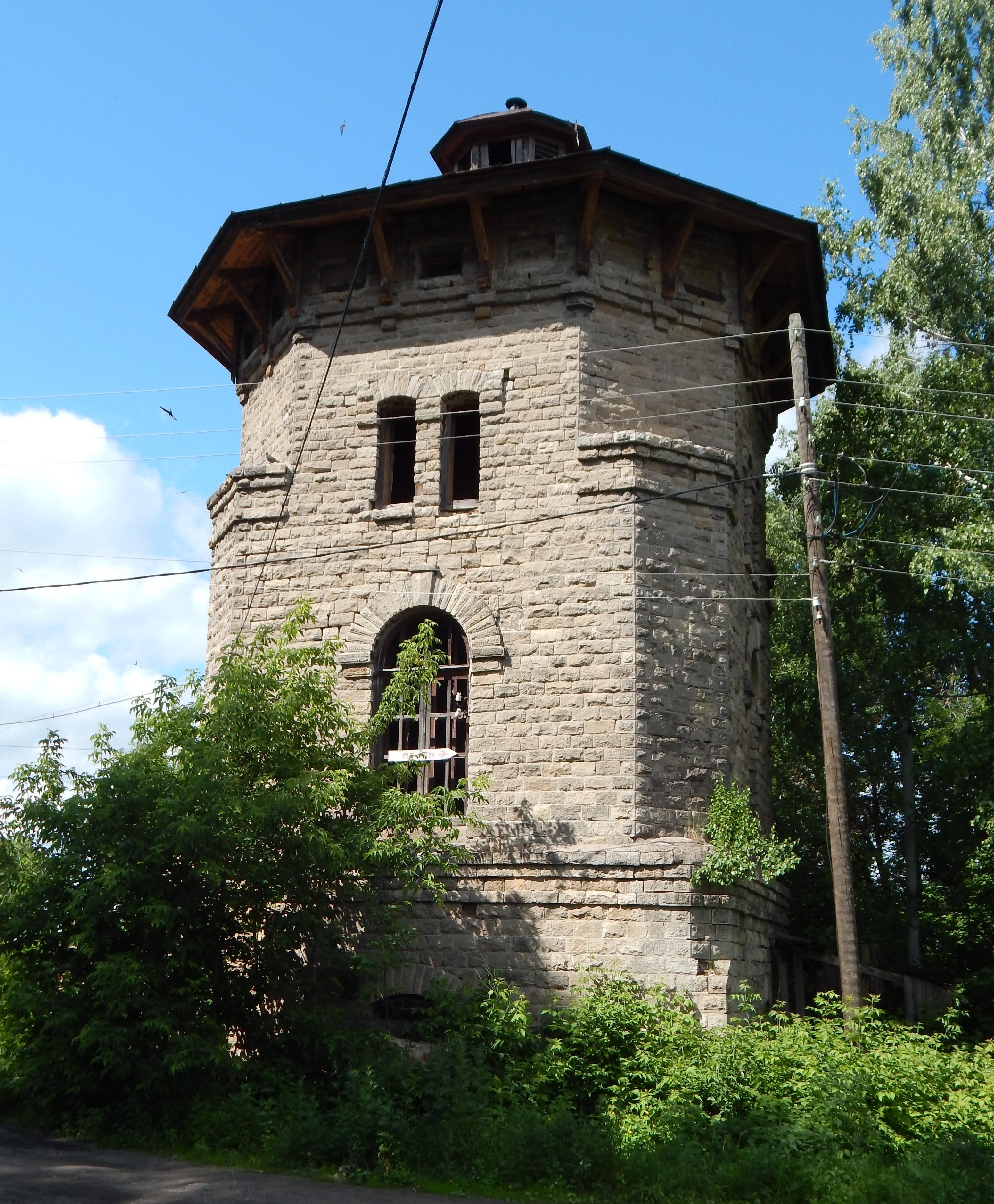 Водонапорная башня в Свече